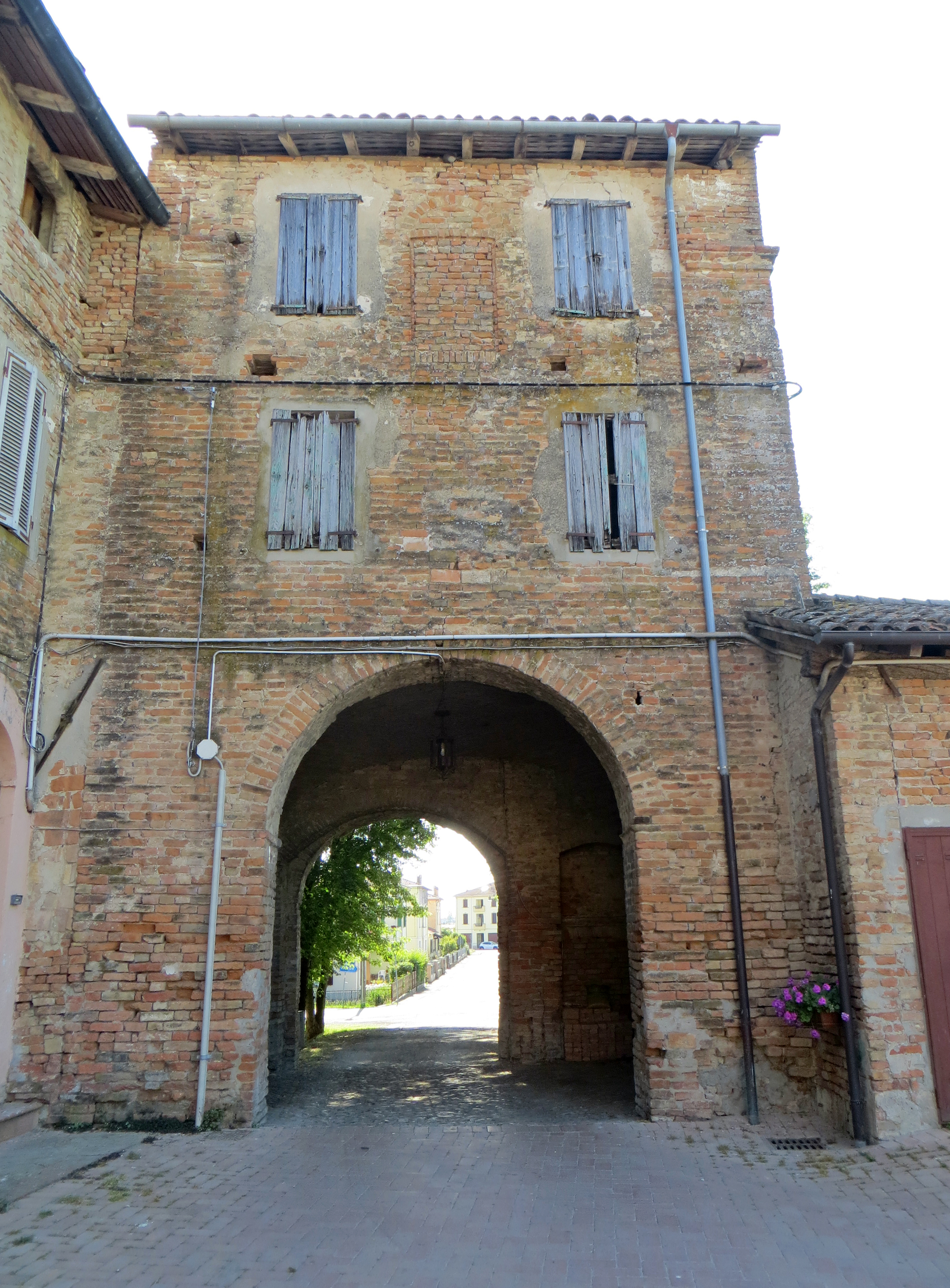 Monastero di Santa Maria Assunta (Castione Marchesi, Fidenza) - lato interno del rivellino d'ingresso